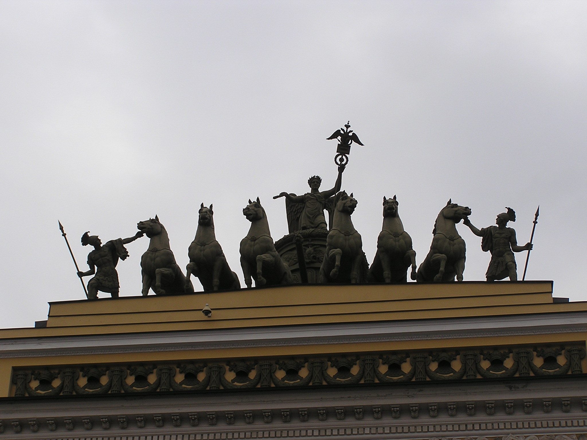 Санкт-Петербург. Колесница Победы на арке Главного штаба